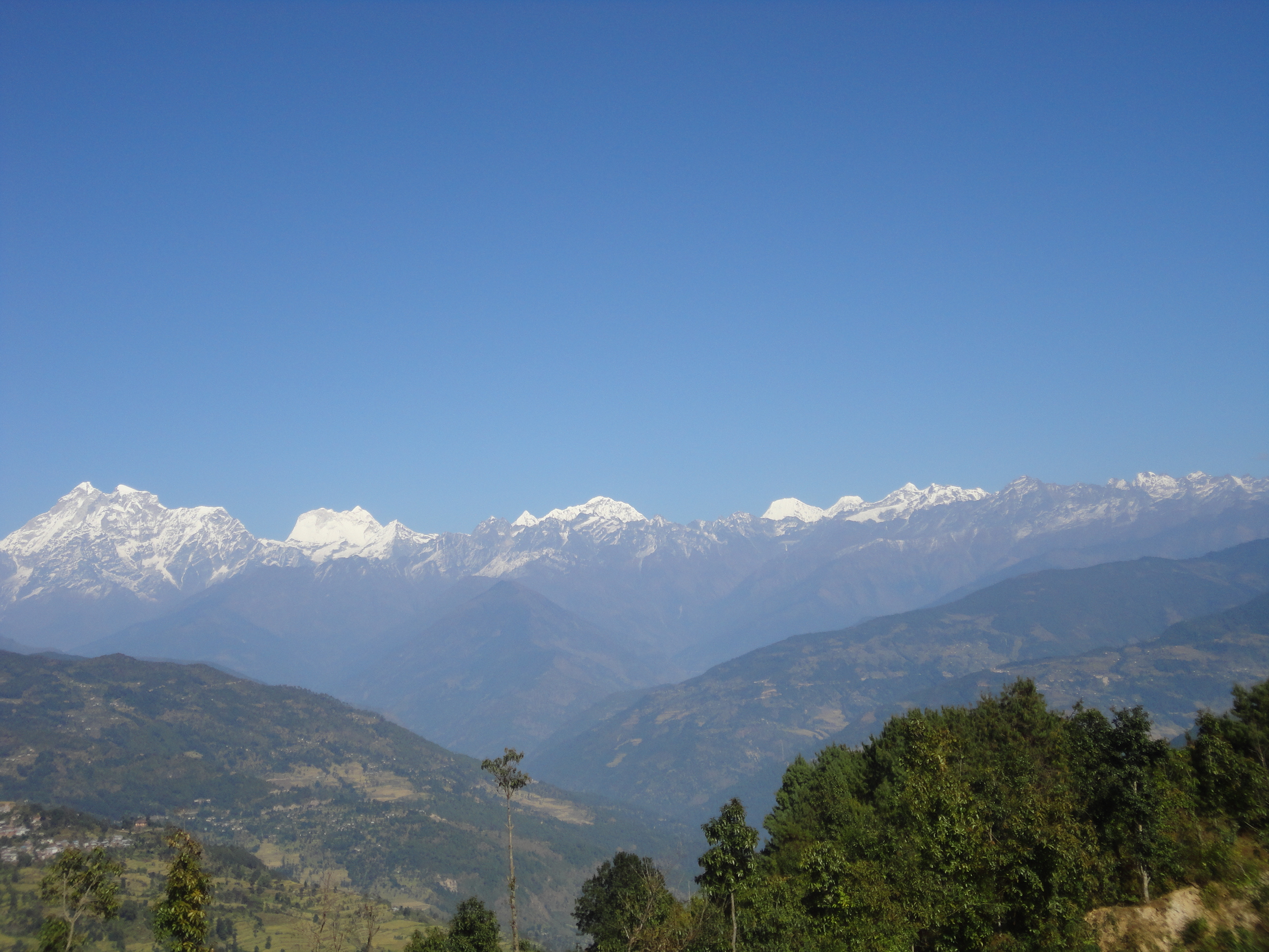 नेपाली: चरिकोटबाट गौरिशंकारहिमाललगायत को लहर